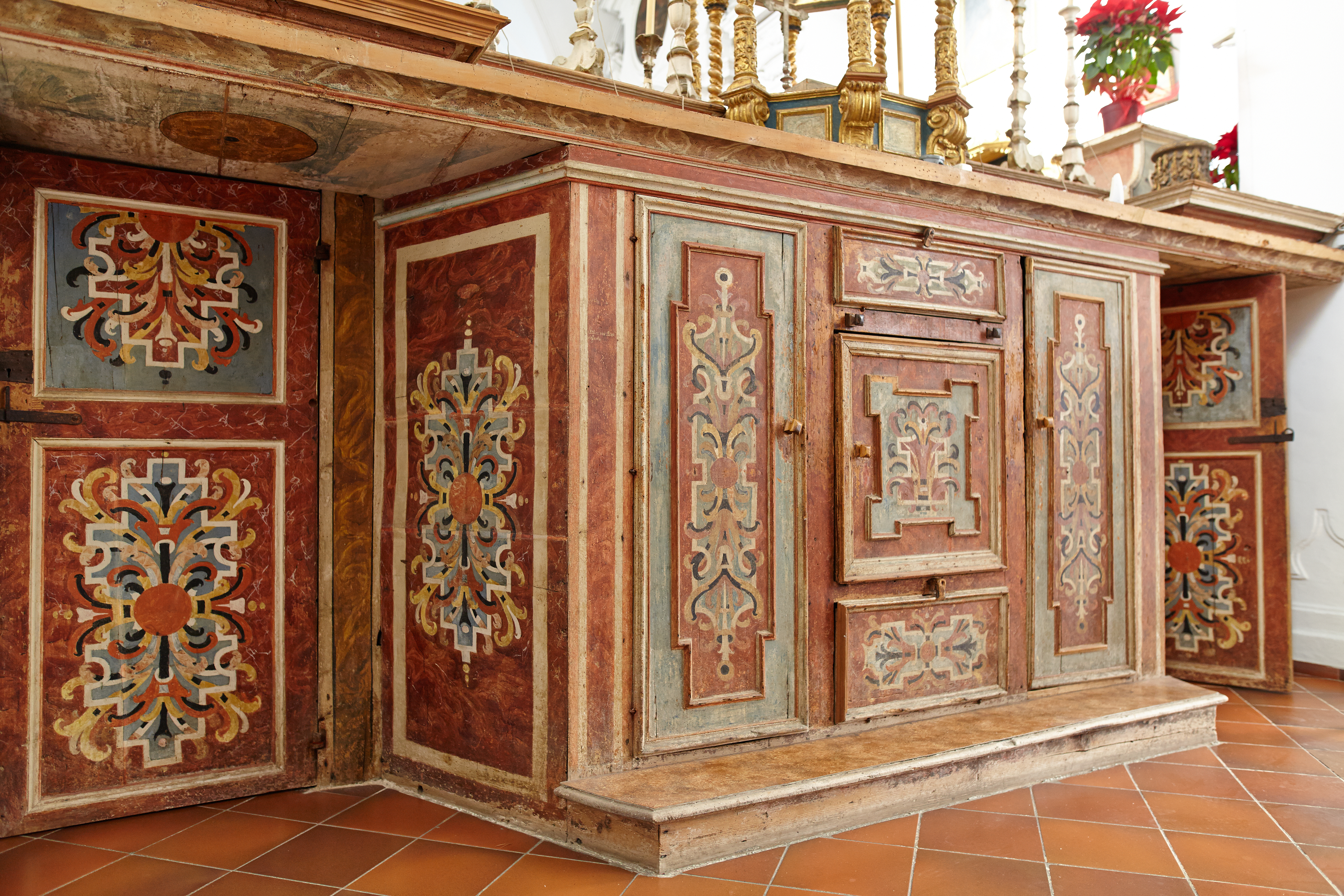 Istituto Sant'Onofrio (ex convento) This is a photo of a monument which is part of cultural heritage of Italy.